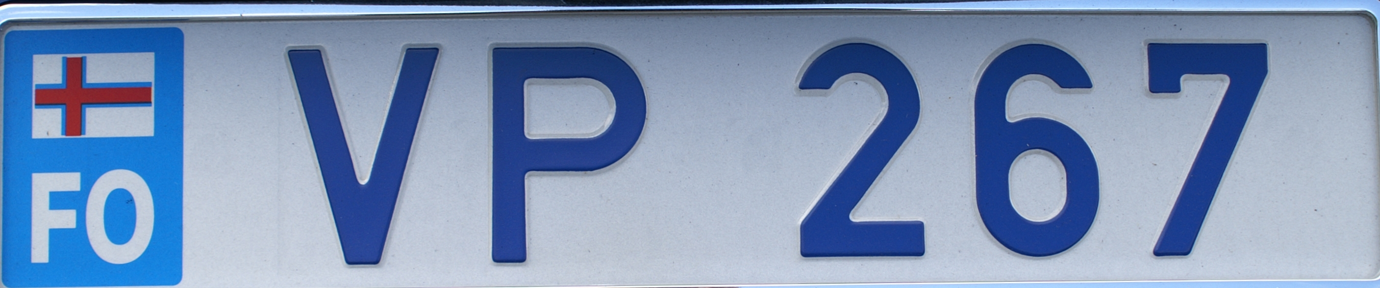 licenseplate of Faroe Islands